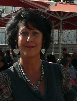 Monique Boulestin,Place de la Motte